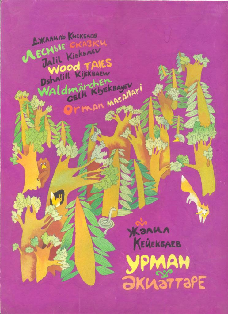 Обложка книги "Лесные сказки"